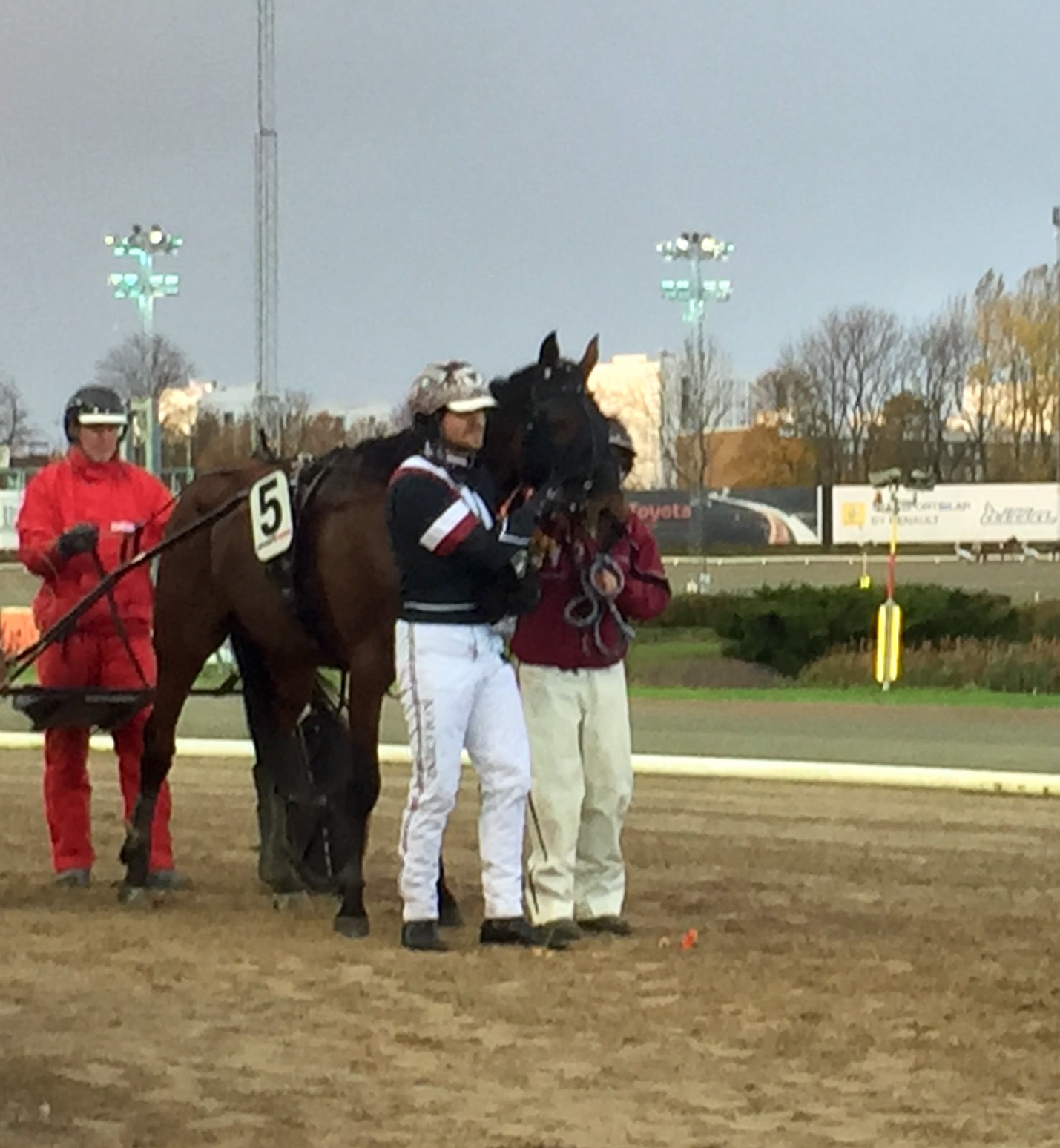 Platon Face (tränad av Lutfi Kolgjini) och kusken Adrian Kolgjini efter V75-segern på Jägersro den 28 oktober 2017.